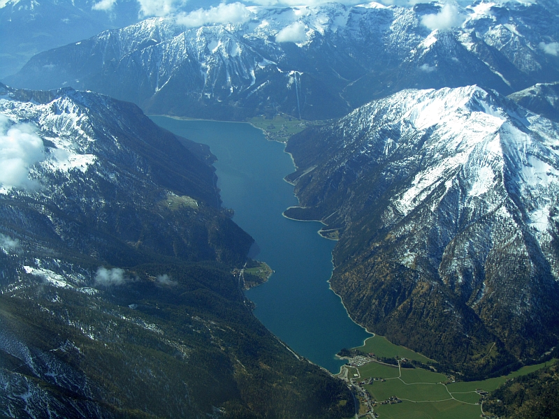 Der Achensee in Blickrichtung Süden.